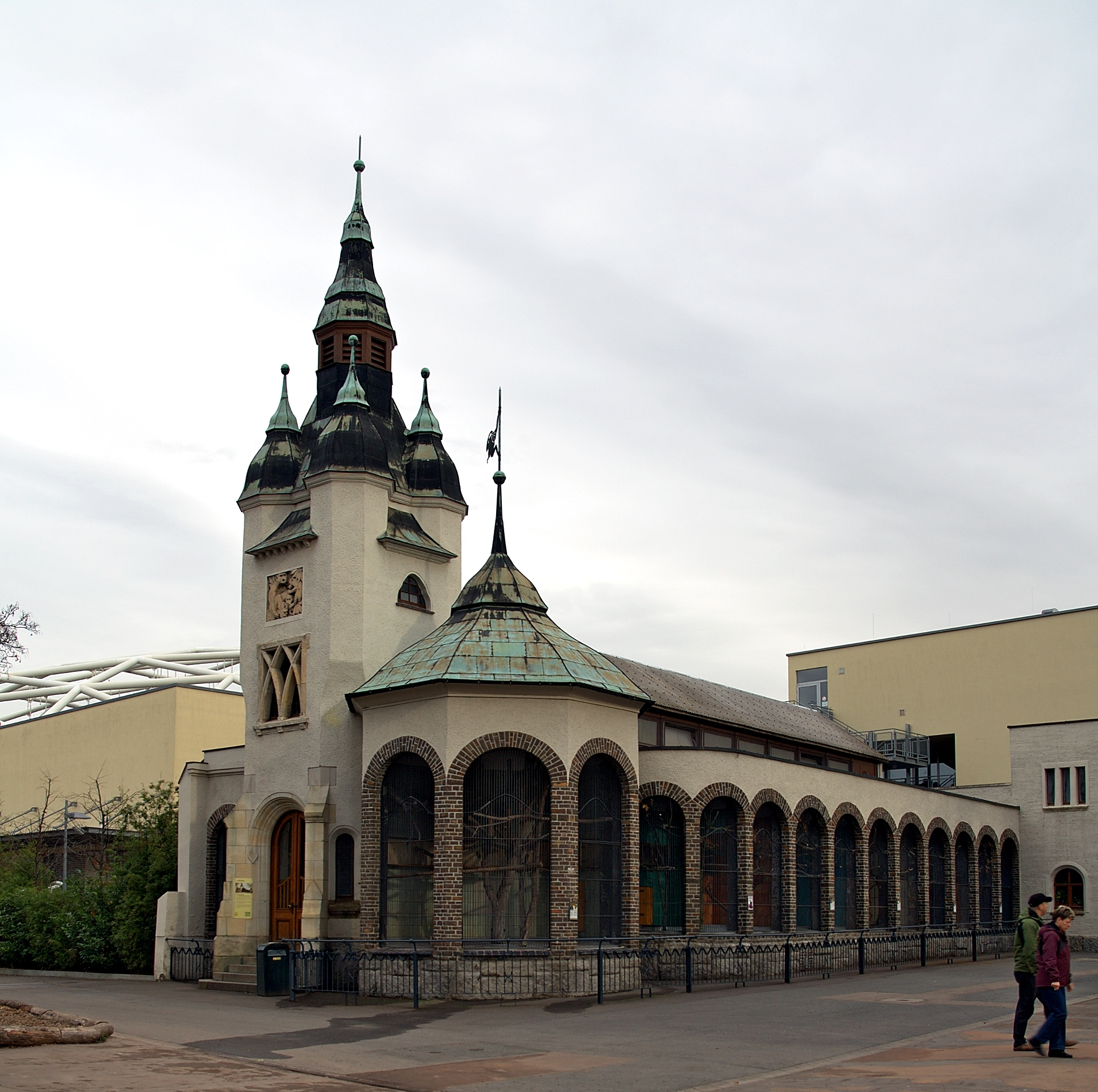 Tieraffenhaus im Zoo Leipzig. Camera data Camera Canon EOS 1000D Lens Sigma 17-70 mm 1:2.8-4.5 DC Macro Focal length 17 mm Aperture f/6.3 Exposure time 1/60 s Sensivity ISO 100